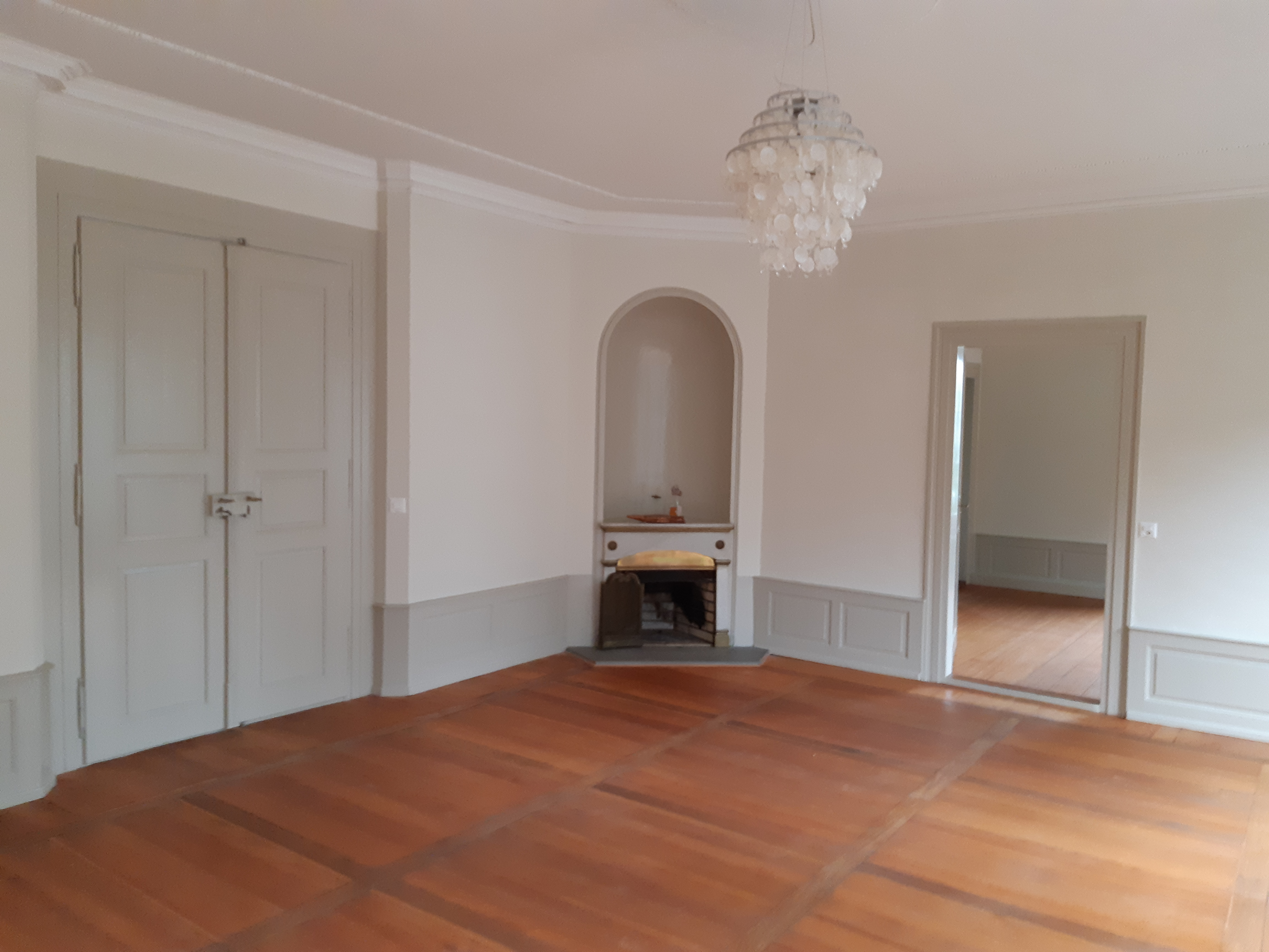 Villa Malaga, Wohnraum 1. Stockwerk, in Lenzburg (Switzerland)